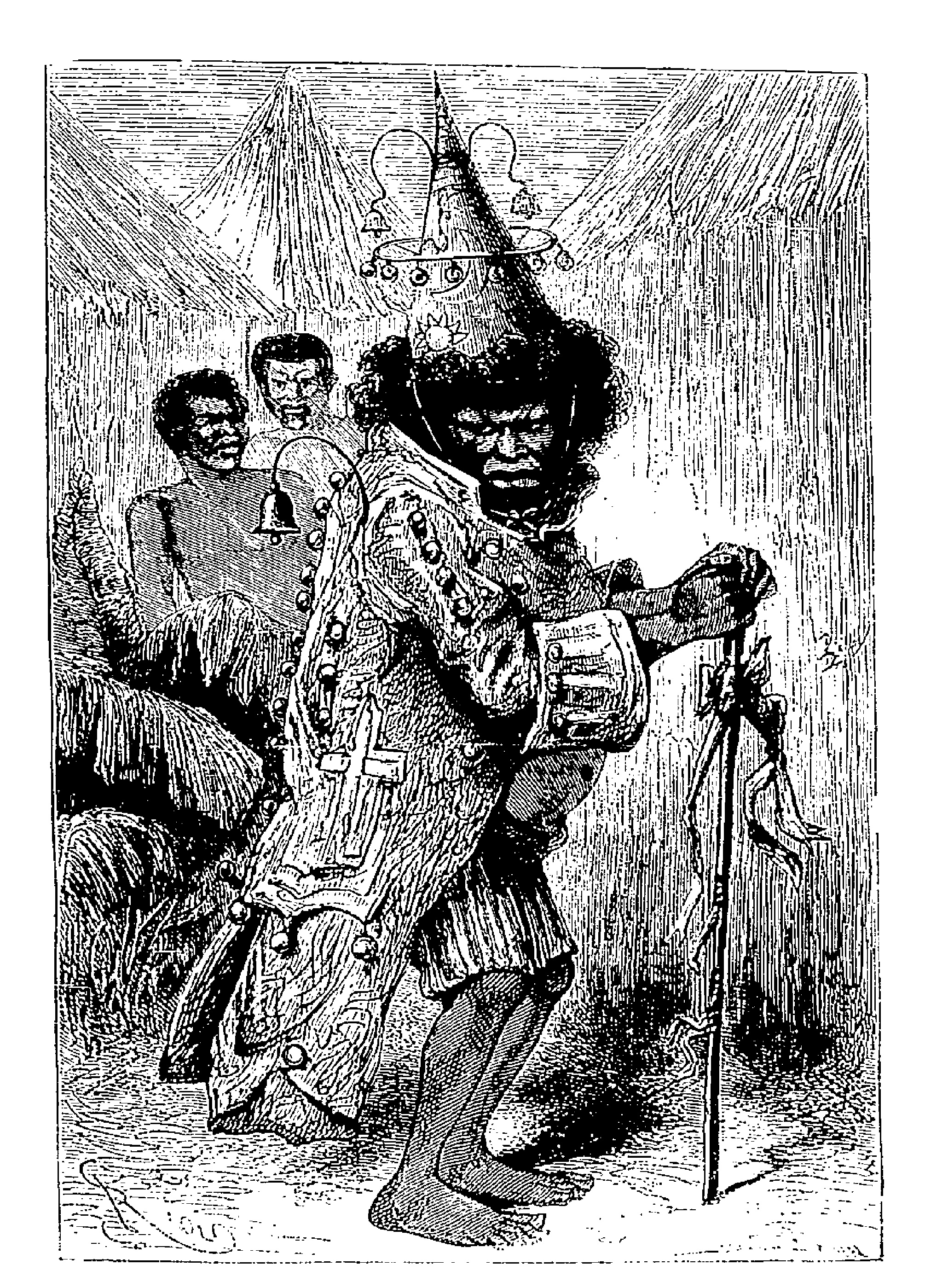 Illustrations for "Bug-Jargal" by Victor Hugo